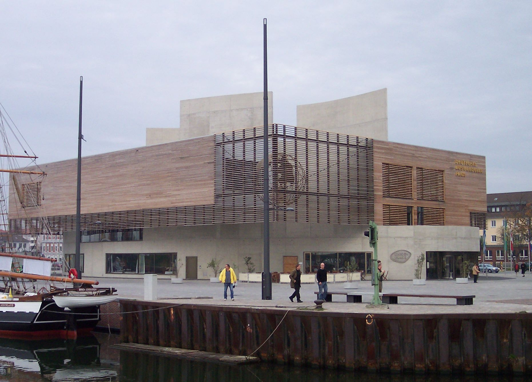 German Emigration CenterNative nameDeutsches AuswandererhausLocationColumbusstraße 65 27568 Bremerhaven GermanyCoordinates53° 32′ 43.0″ N, 8° 34′ 27.0″ EEstablished8 August 2005WebsiteDeutsches AuswandererhausAuthority controlVIAF: 131244556 | LCCN: nr2005008075 | GND: 998188832 | WorldCat